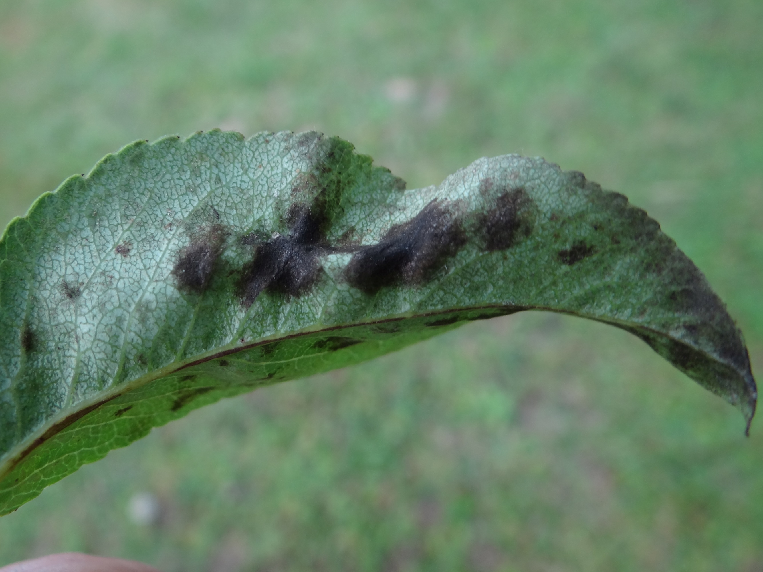 Venturia pyrina on Pyrus communis